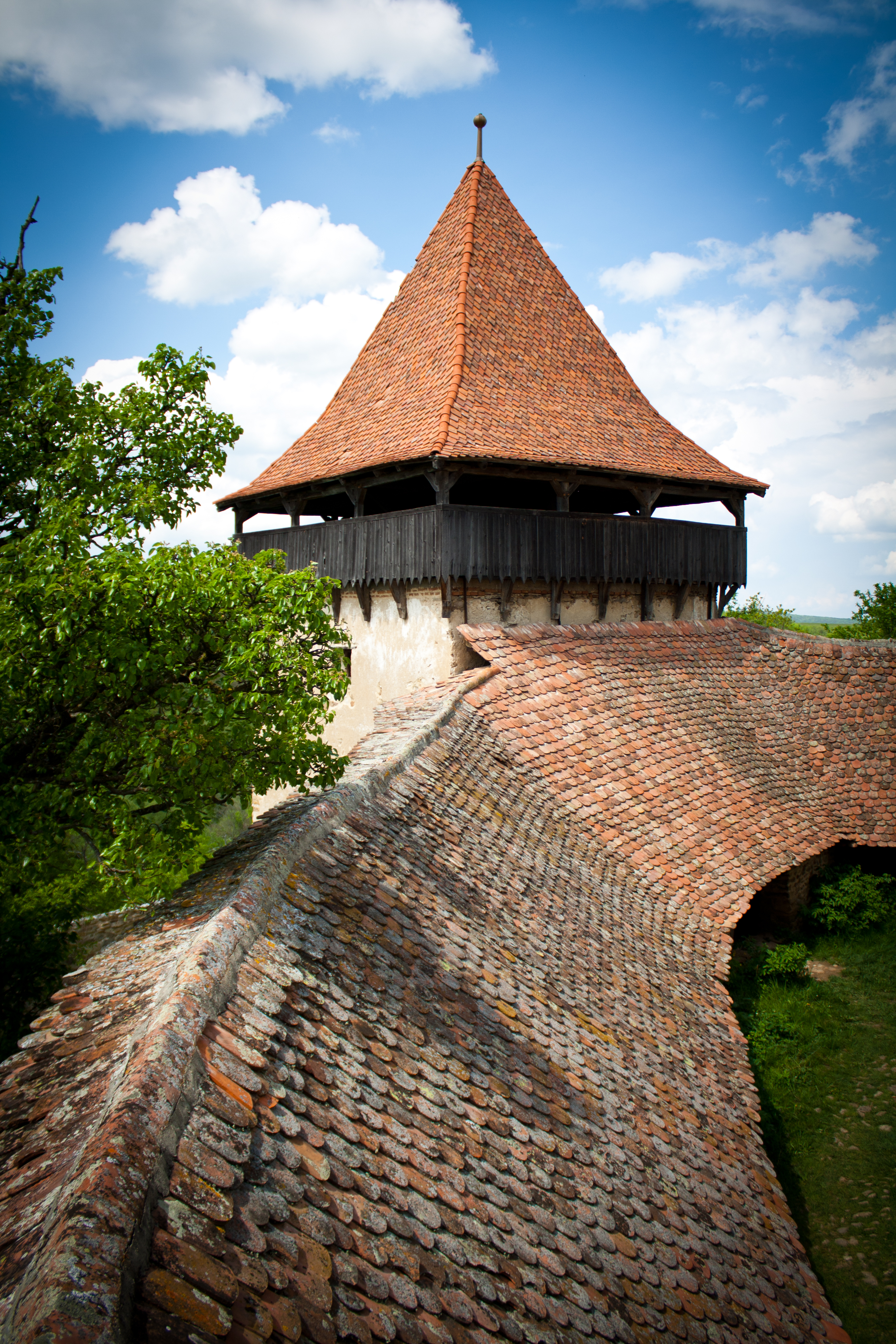 02 (Cod RAN: 40759.09.01)